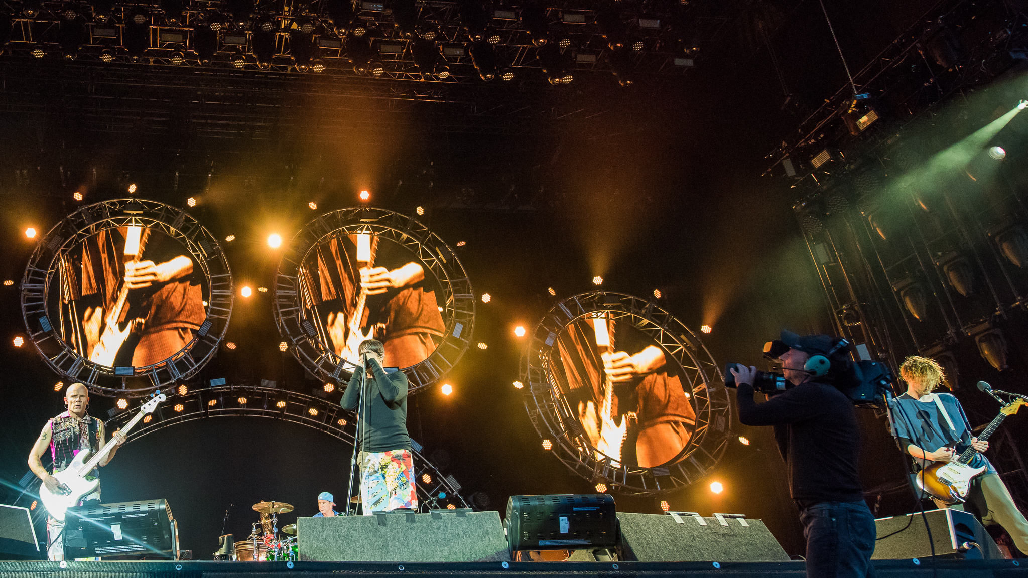 ARGO-Konzerte,Anthony Kiedis,Chad Smith,Festival,Josh Klinghoffer,Konzert,Livekonzert,Livemusik,Michael „Flea“ Balzary,Musik,Red Hot Chili Peppers,RiP,Rock im Park 2016,Seat Zeppelin Stage